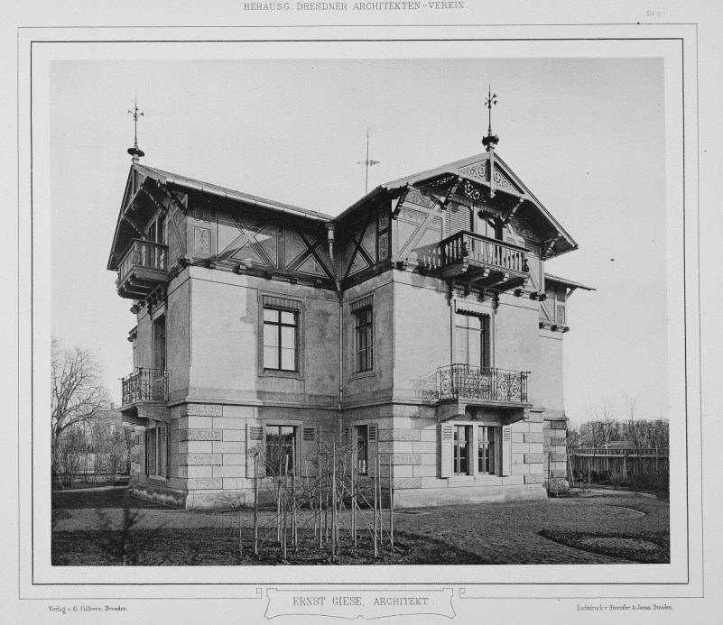 Landhaus des Herrn Barteldes in Blasewitz bei Dresden • Hauptansicht